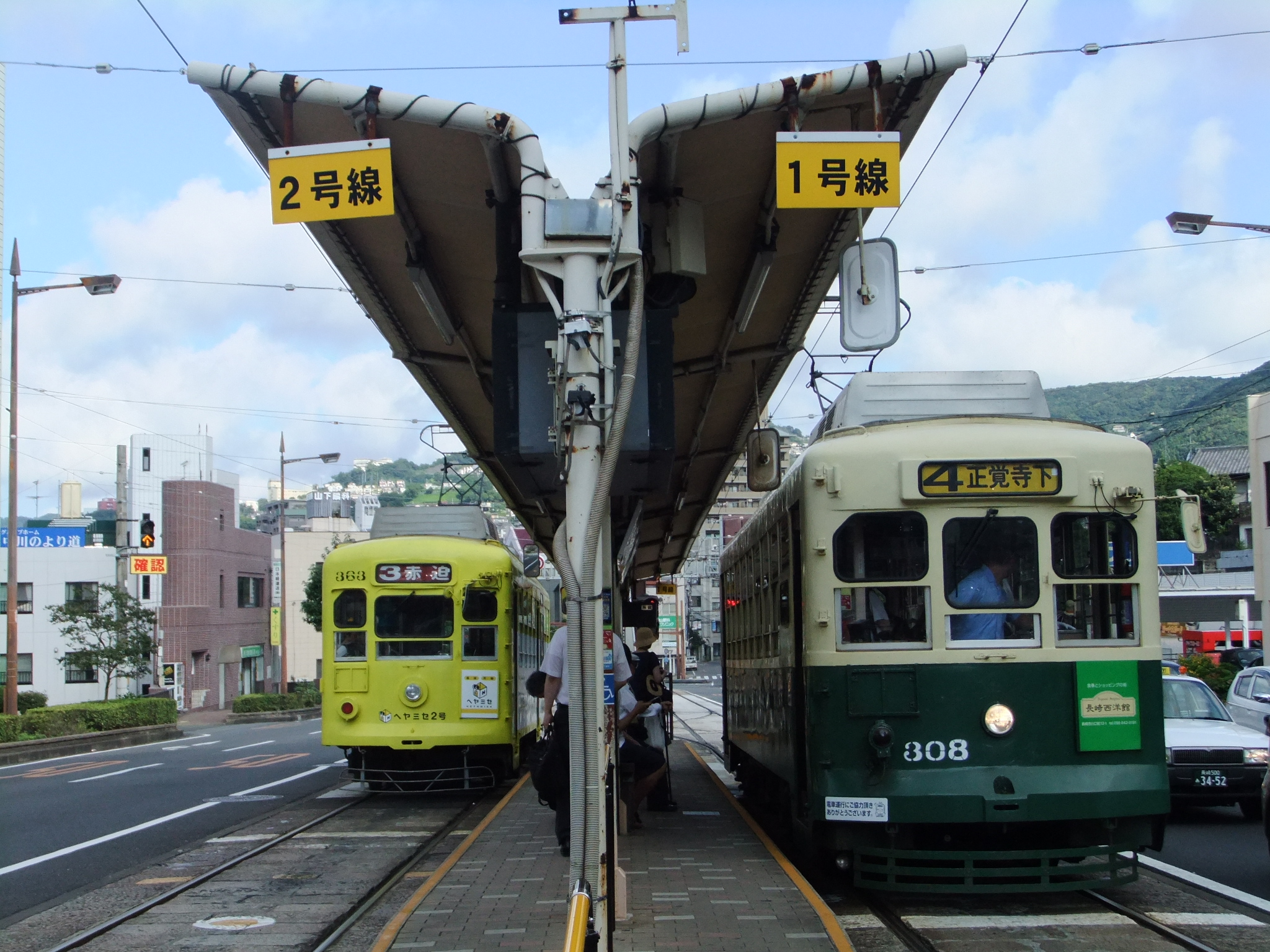 蛍茶屋停留場ホーム